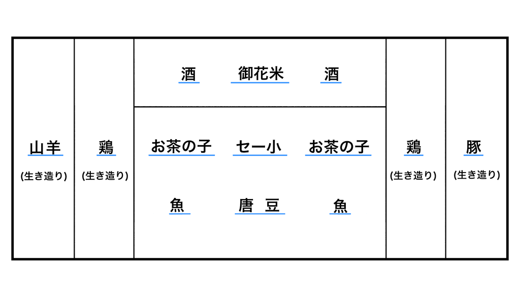 供え物です